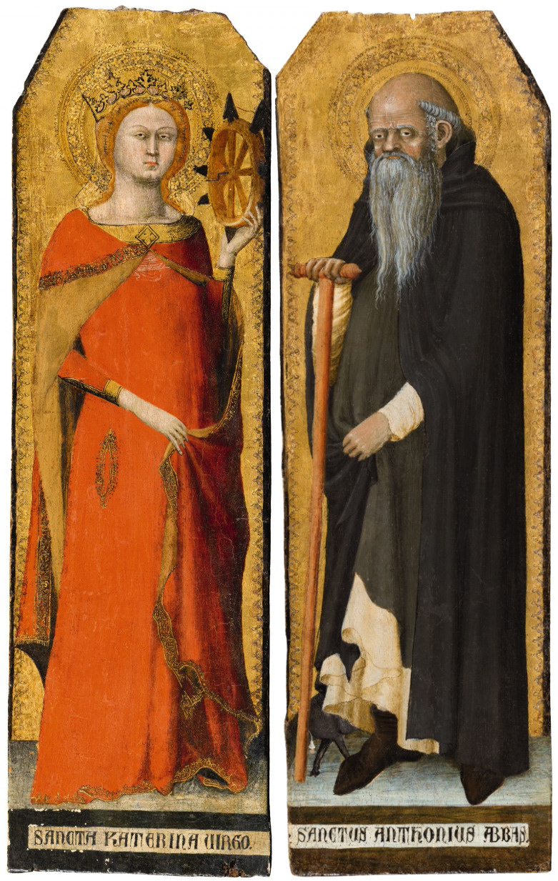 Zwei Bilder eines Flügelaltars von Matteo Giovannetti